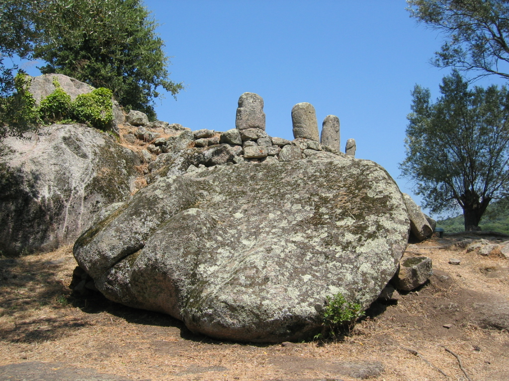 Filitosa (Corse-du-Sud, France) - L'oppidum.